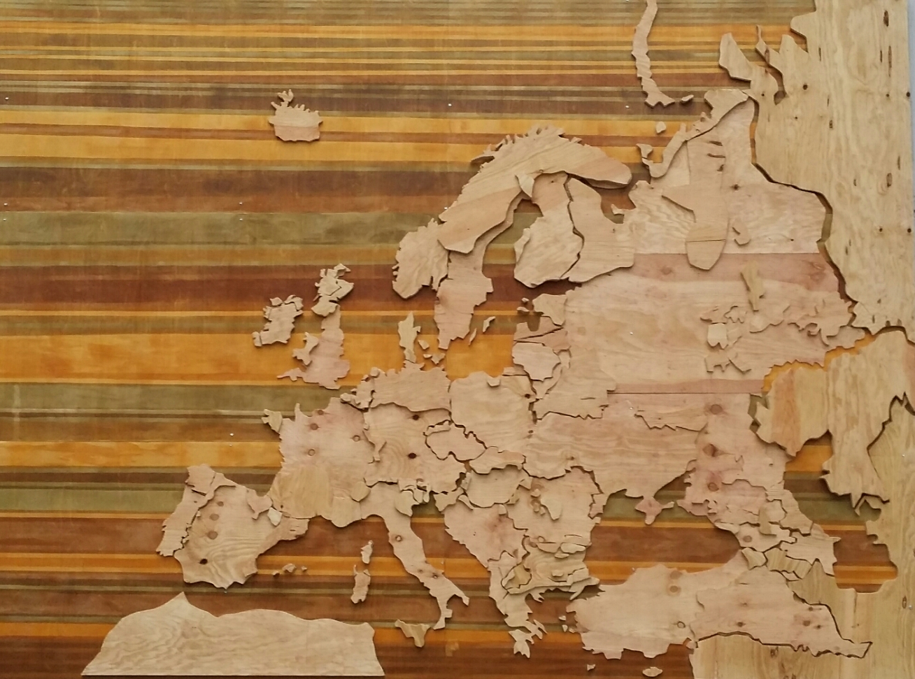 Europako hizkuntzen egurrezko mapa Tabakalerako sarreran.